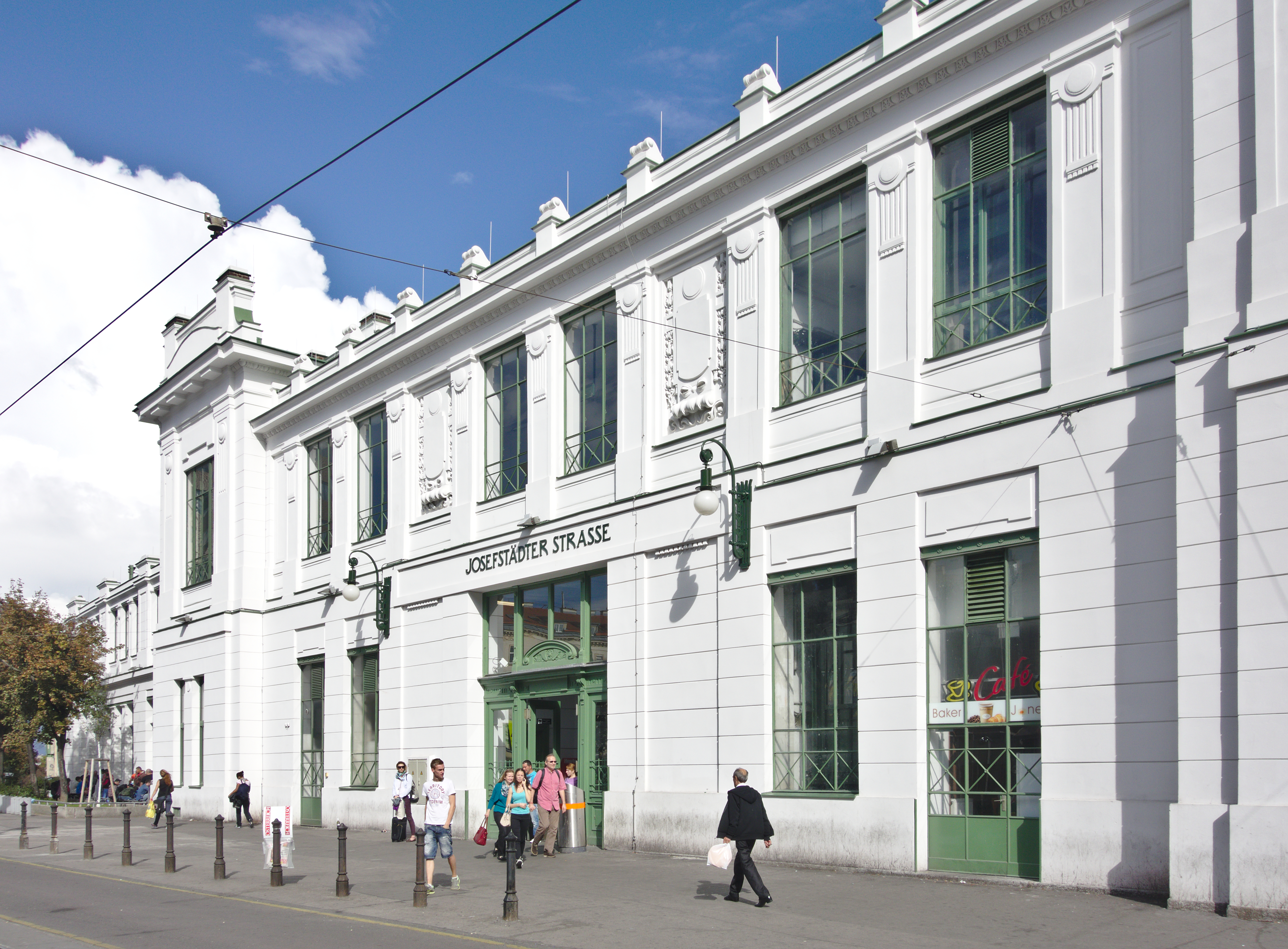 U-Bahnstation Josefstädter Straße, U-Bahn Bogen 42